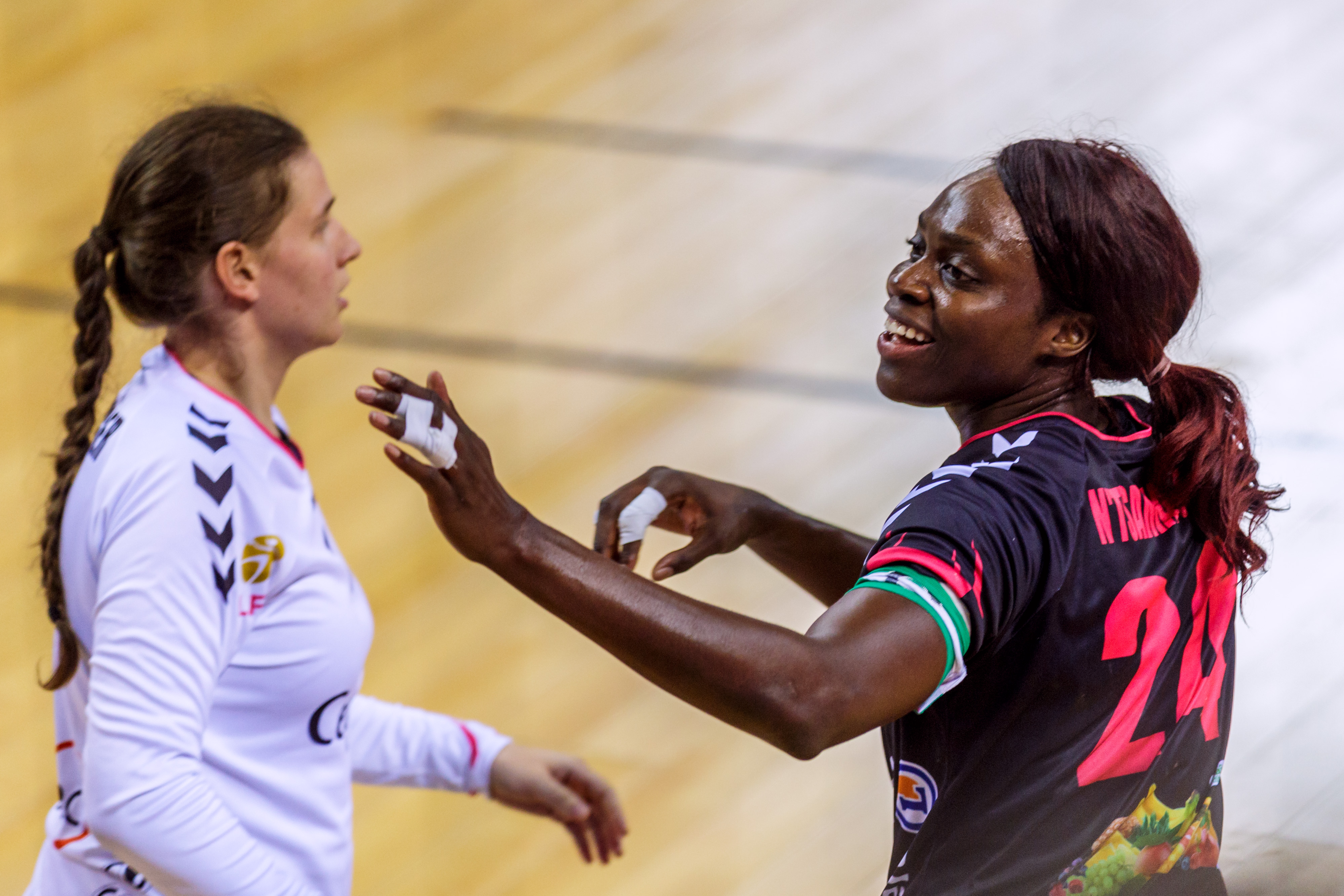 Match de handball du BREST Bretagne Handball à domicile face à Besançon (Entente Sportive Bisontine Féminin) le 16 novembre 2016. La Brest Arena a vu son club l'emporter 24-21.